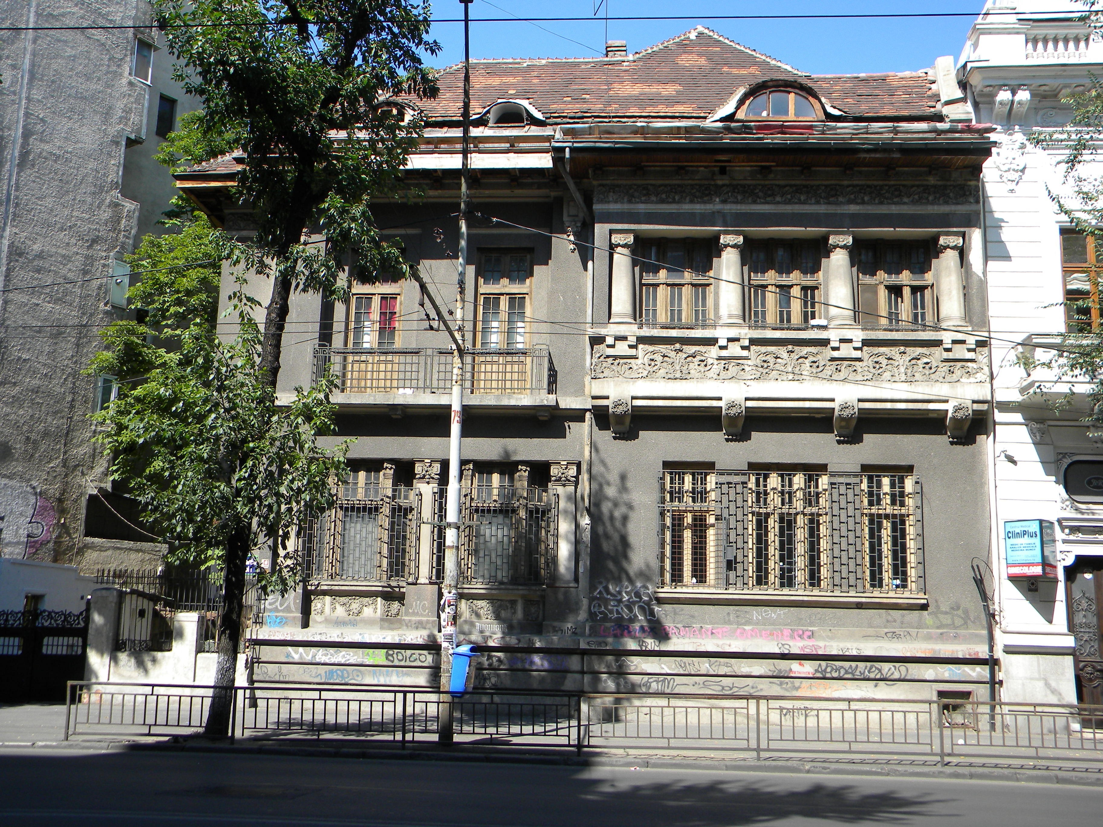 Imobil pe Bd. Carol I nr. 53, Bucuresti sect. 2